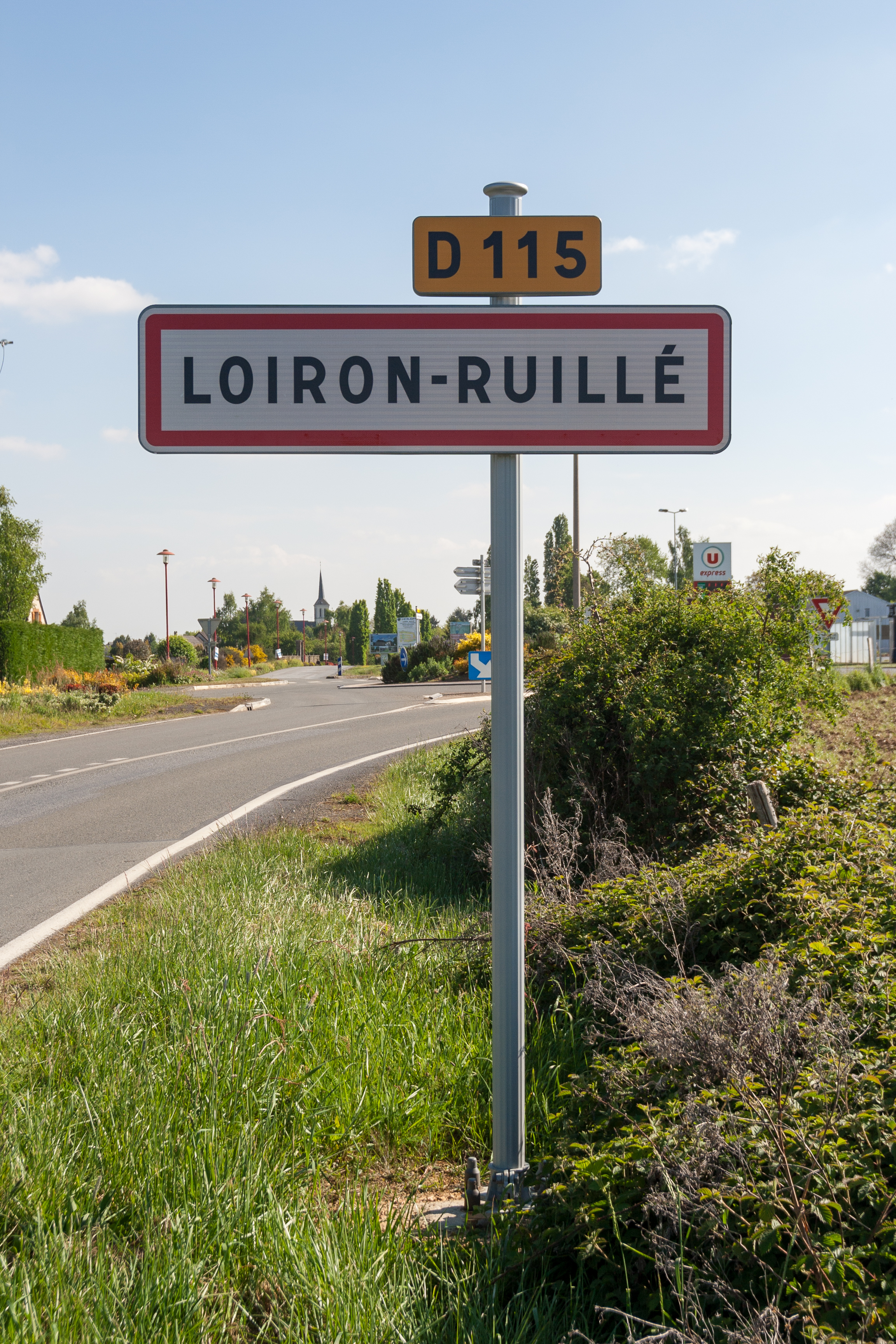 Entrée du bourg de Loiron-Ruillé par la D115.